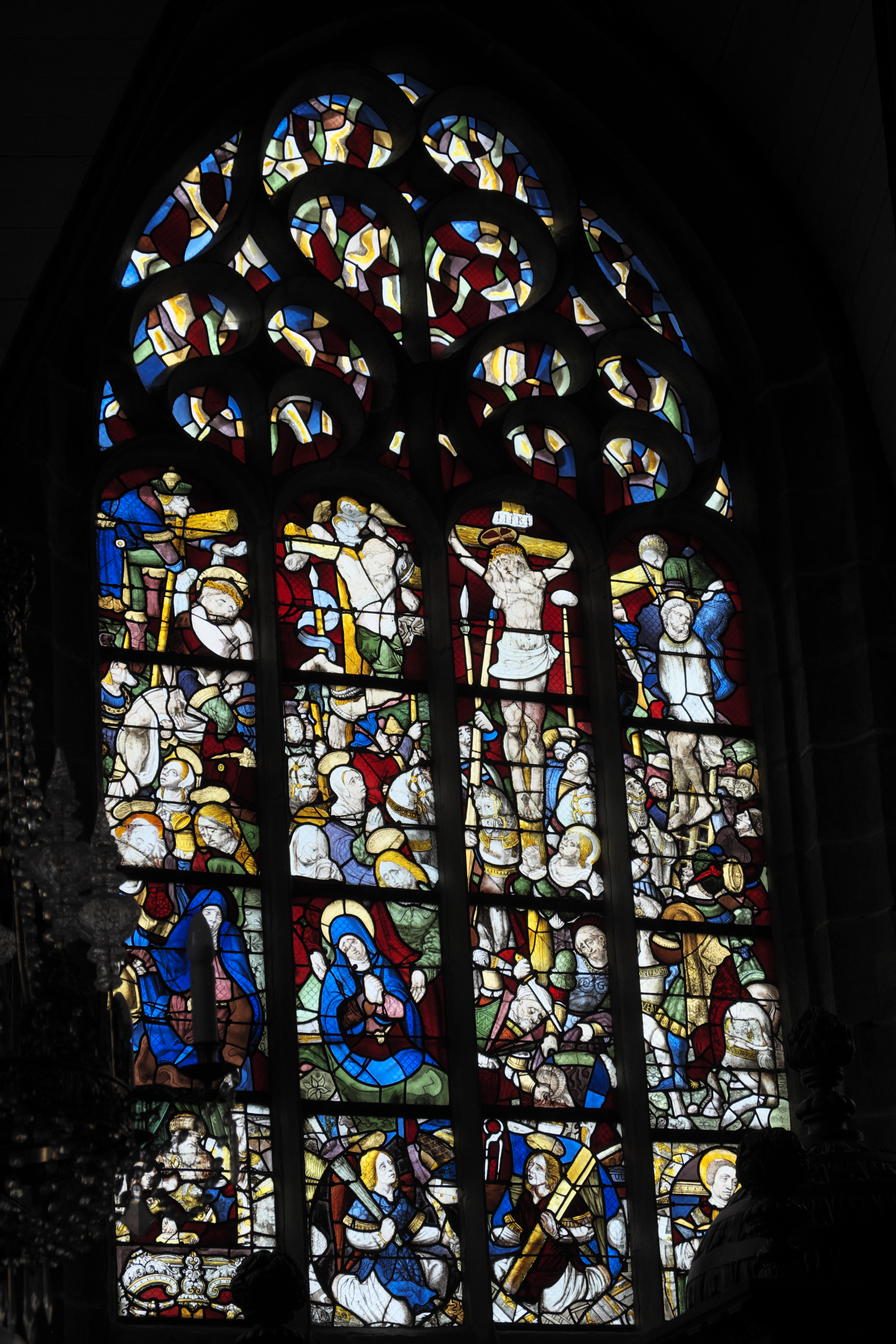 Kreuzigungsfenster in der katholischen Pfarrkirche Saint-Miliau in Guimiliau im Département Finistère (Region Bretagne/Frankreich), um 1550